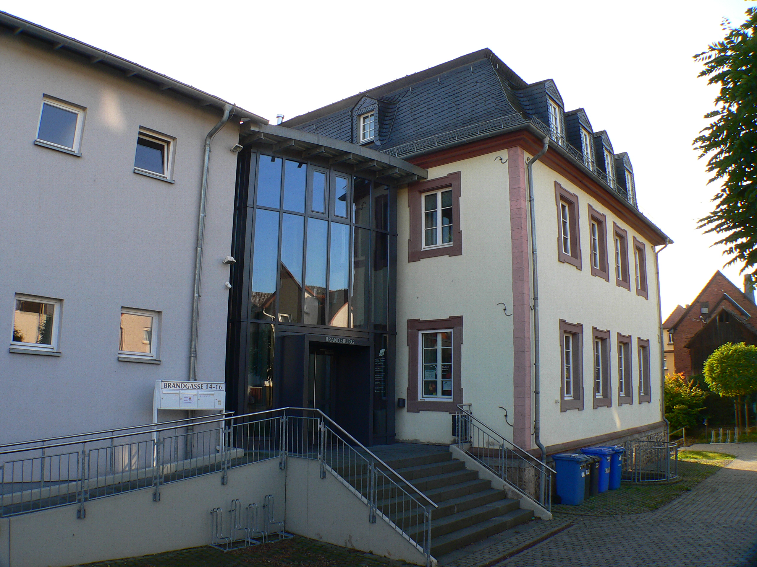 Brandsburg in Buseck im Landkreis Gießen, Hessen, Deutschland. Moderner Anbau